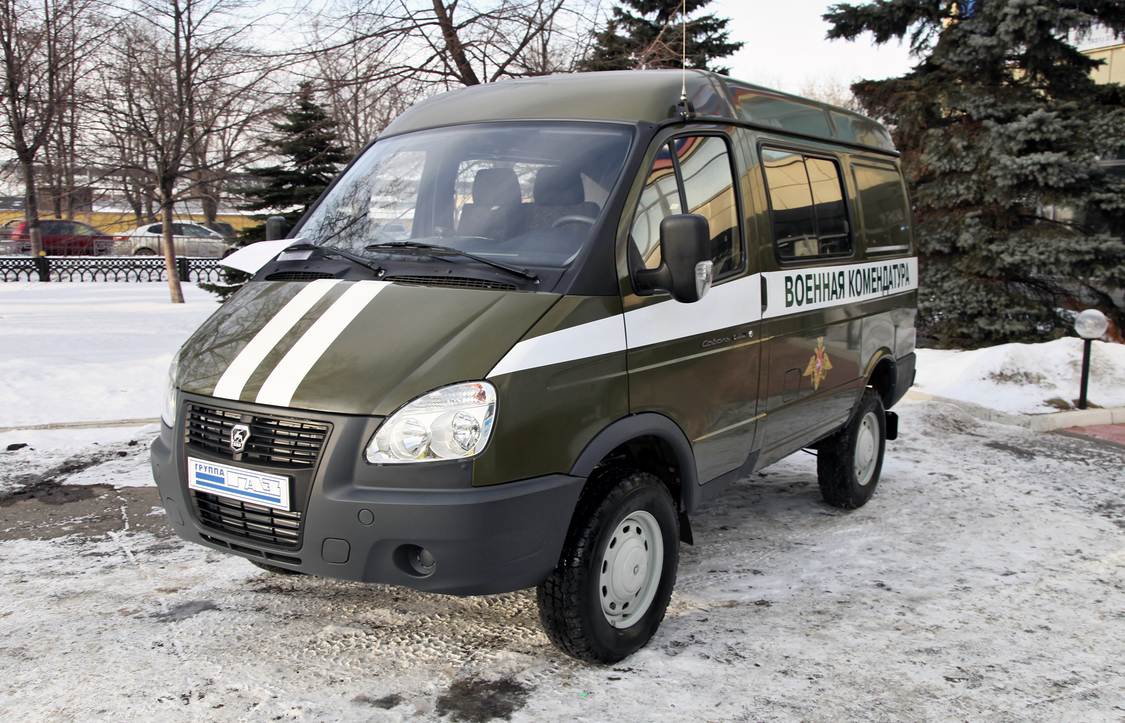 Автомобиль военной инспекции на базе ГАЗ-27527 Соболь (Military inspection vehicle on GAZ-27527 base)